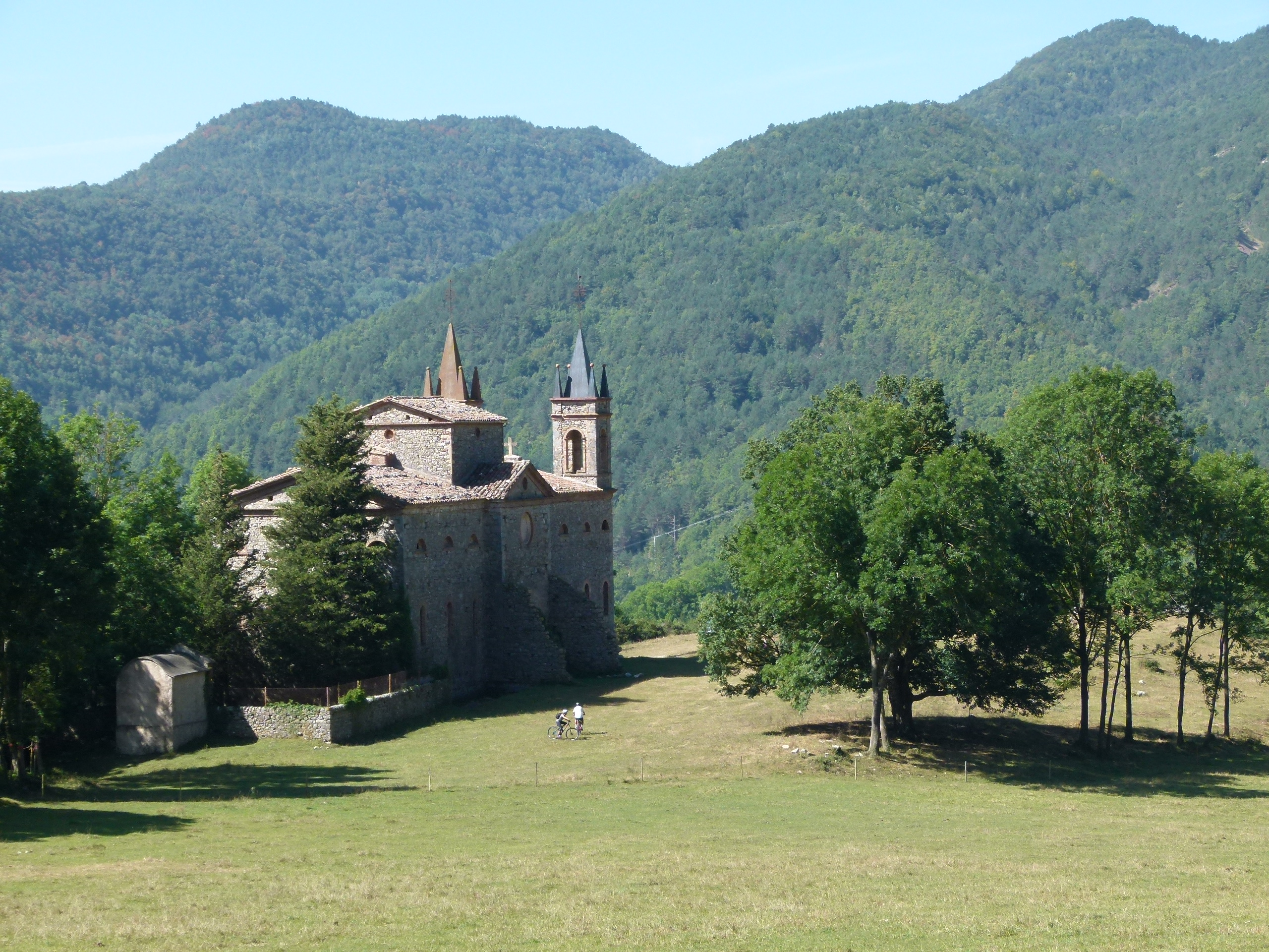 Auró del Remei (Camprodon) This is a a photo of a protected or outstanding tree in Catalonia, Spain, with id: MA-31.039.01